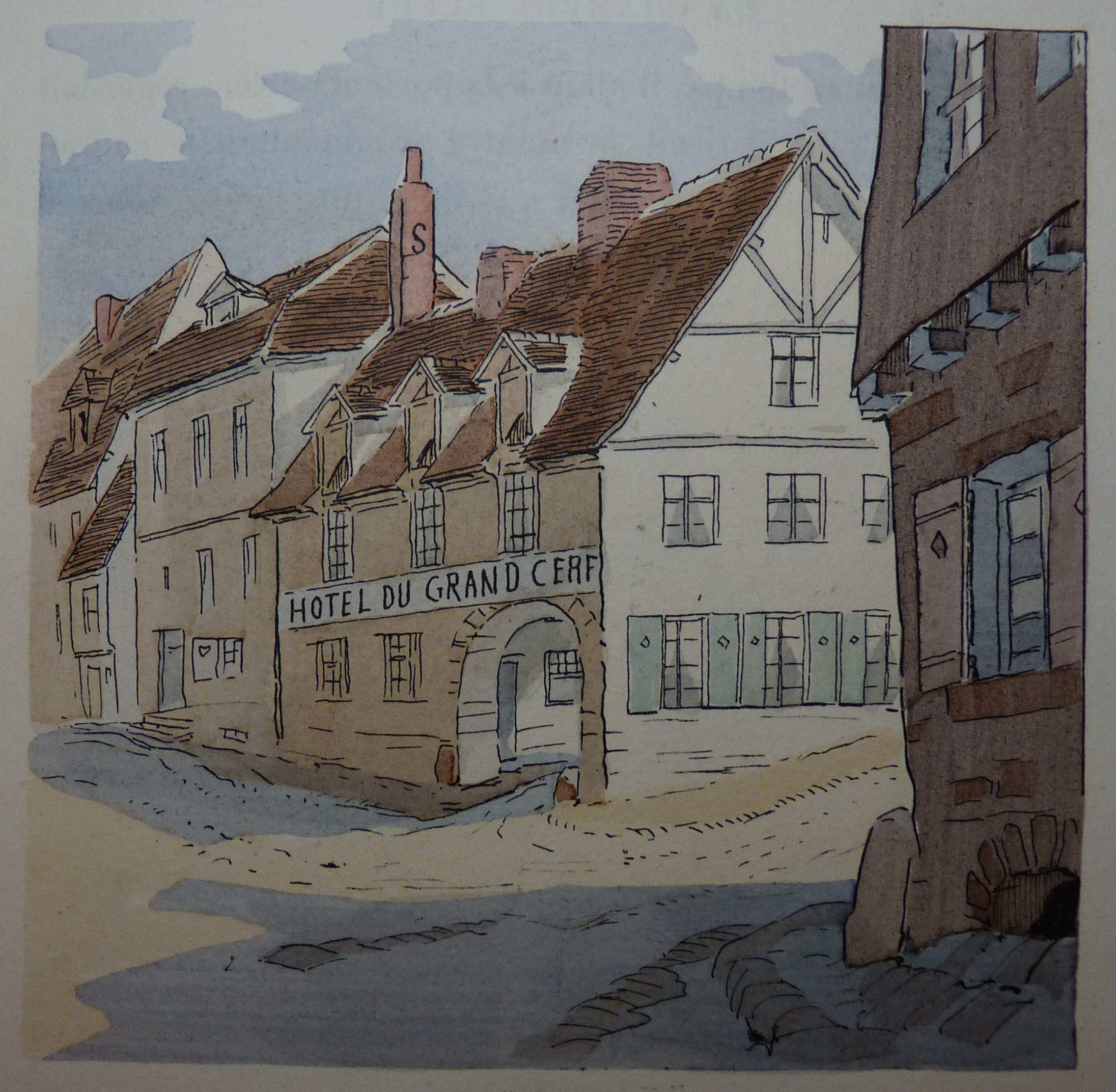 Illustration page 1 de la Chambre bleue de Prosper Mérimée, illustré de 61 aquarelles d'après Eugène Courboin 1851-1915 (gravure de Ducourtioux et Huillard), Paris Libraire L. Conquet